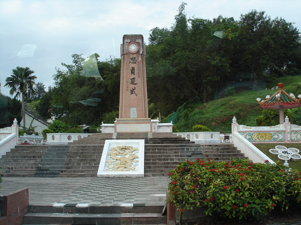 位於馬來西亞麻六甲三寶廟旁的忠貞足式碑